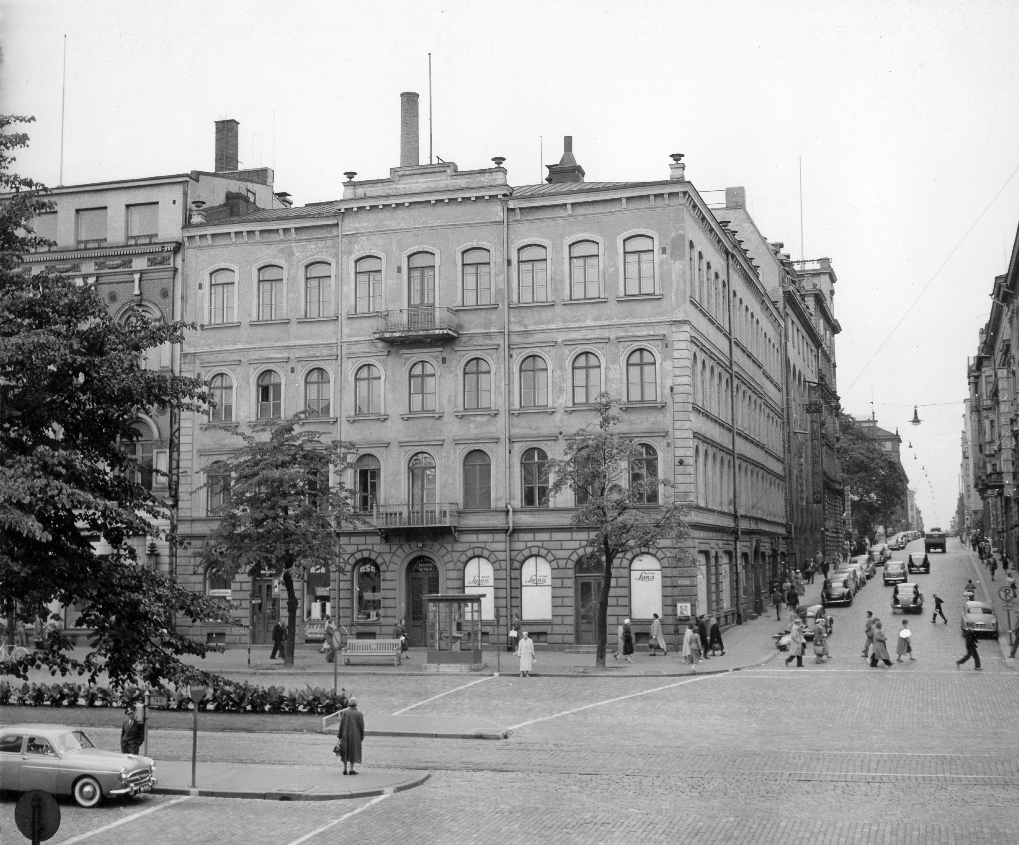 Tabunoffin koulu Mannerheimintie 8 ja Lönnrotinkatu 2 kulmassa.